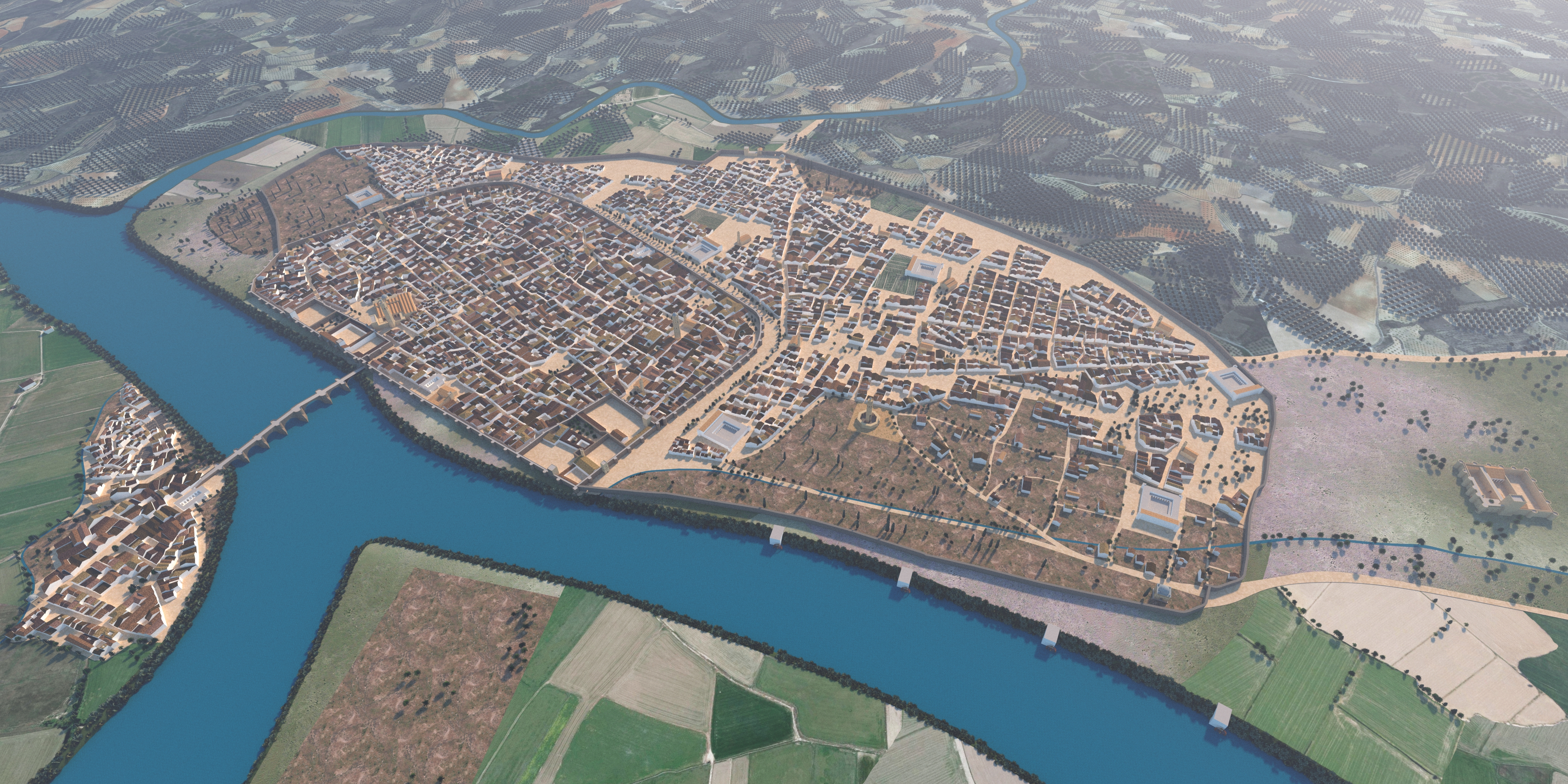 Vista de Saraqusta (Zaragoza) en 1118. Elaborada por el equipo de investigación de la Unidad Predepartamental de Arquitectura de la Universidad de Zaragoza, dirigida por Javier Peña Gonzalvo